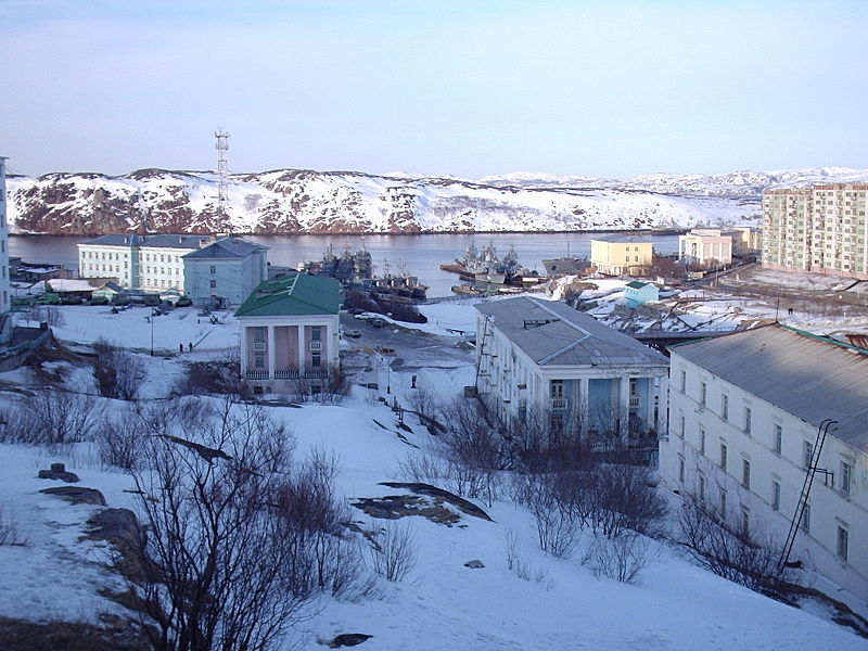 Горад Палярны